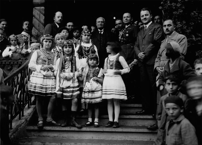 Трускавець. Приїзд президента Естонії К. Петца (в центрі на веранді), 1935